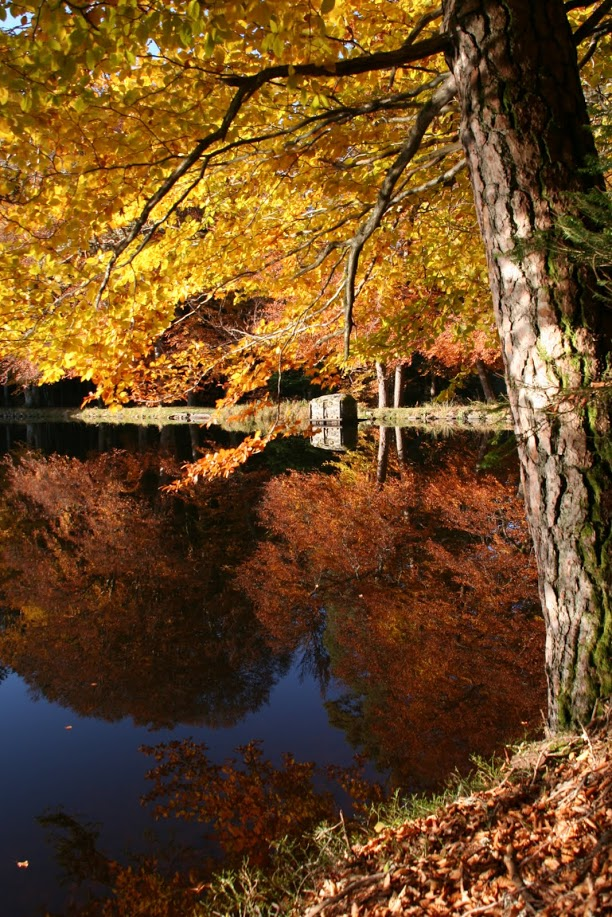 Etang de la Fargette en automne, Saint Germain l'Herm, Puy-de-Dome, France.